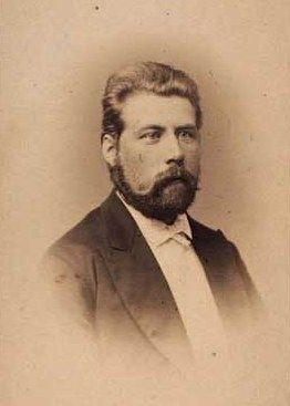 Carl Henrik Kock Møller (1845-1920), Danish painter